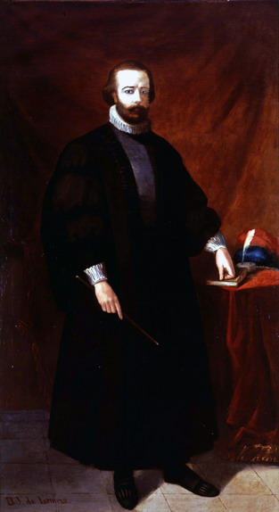 Retrato imaginario del justicia de Aragón Juan de Lanuza y Urrea (1564-1591), que fue decapitado en Zaragoza en 1591 por orden del rey Felipe II de España.